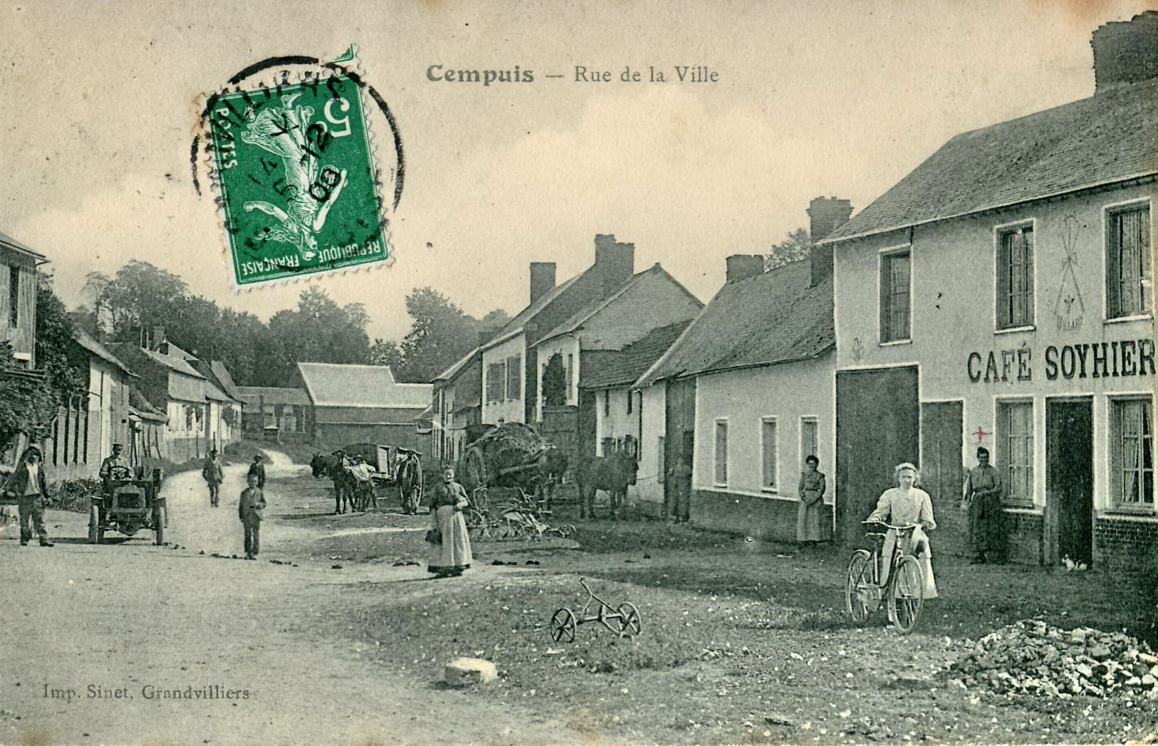 Carte postale ancienne éditée par Sinet CEMPUIS : la rue de la Ville